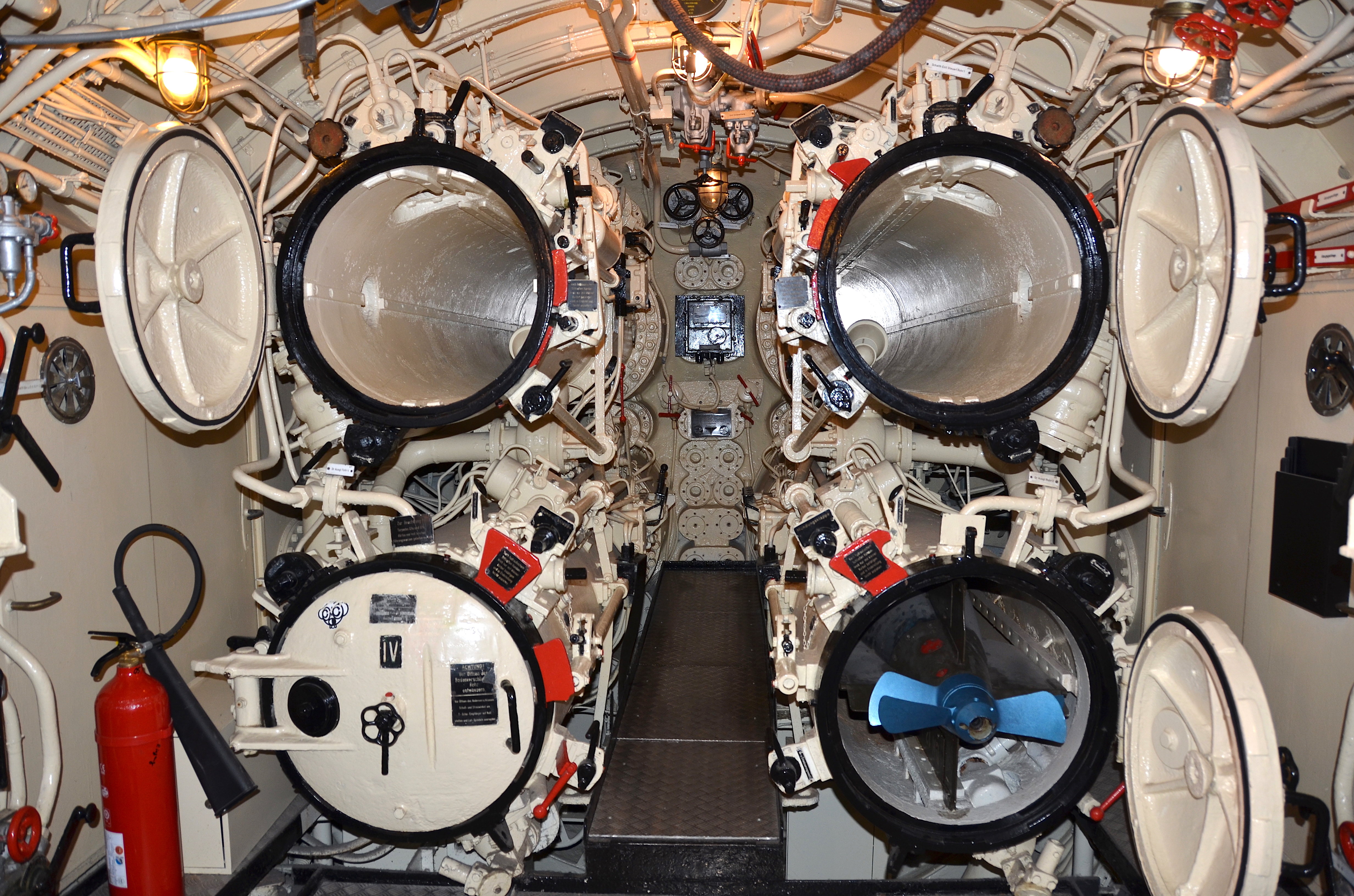 Die vier Bugtorpedorohre vom U-Boot Wilhelm Bauer als Klasse 241